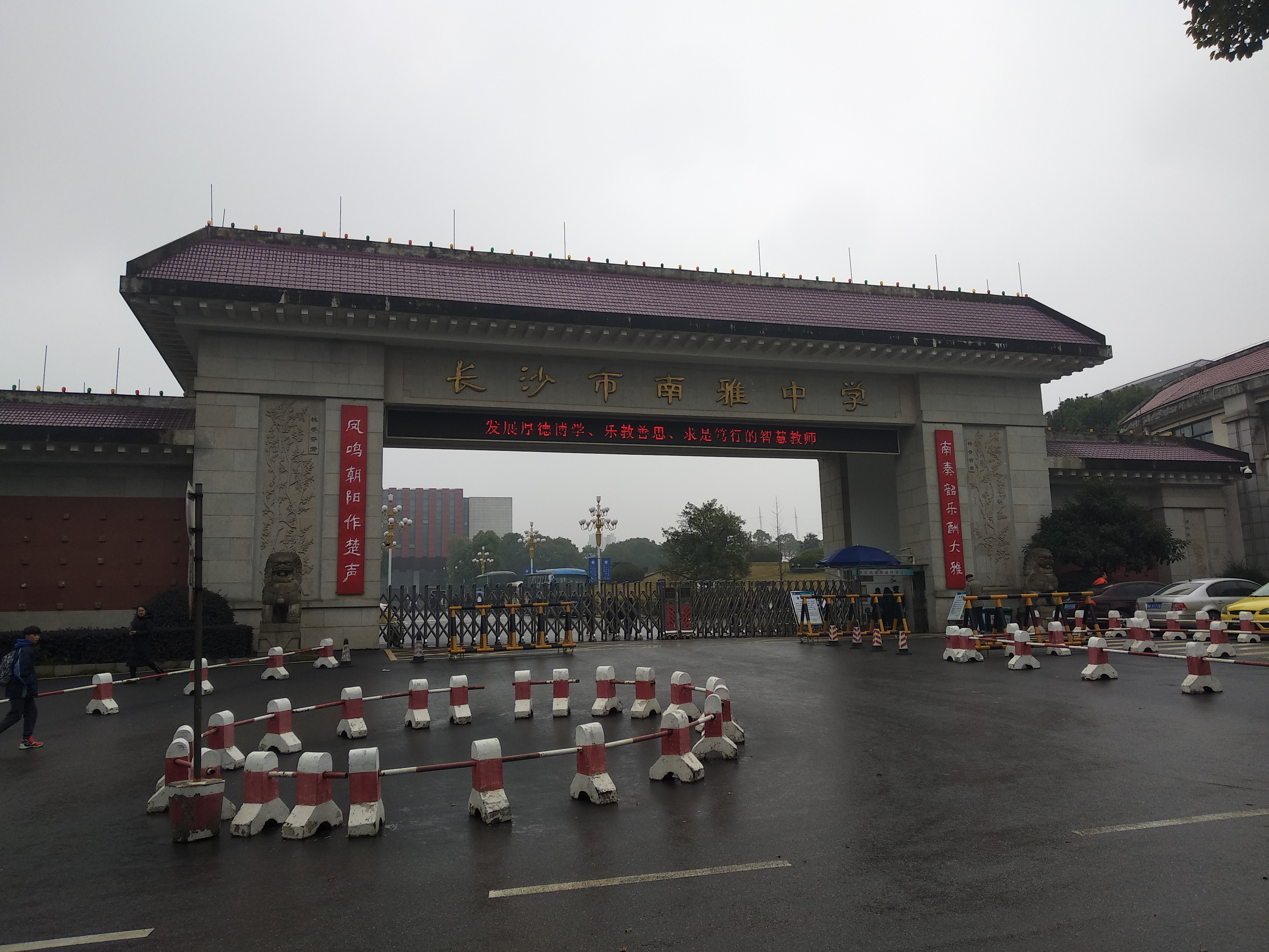 长沙市南雅中学正校门（西门），摄于2018年12月。